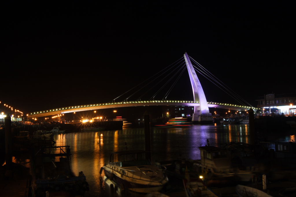 台灣台北縣淡水鎮的淡水漁人碼頭